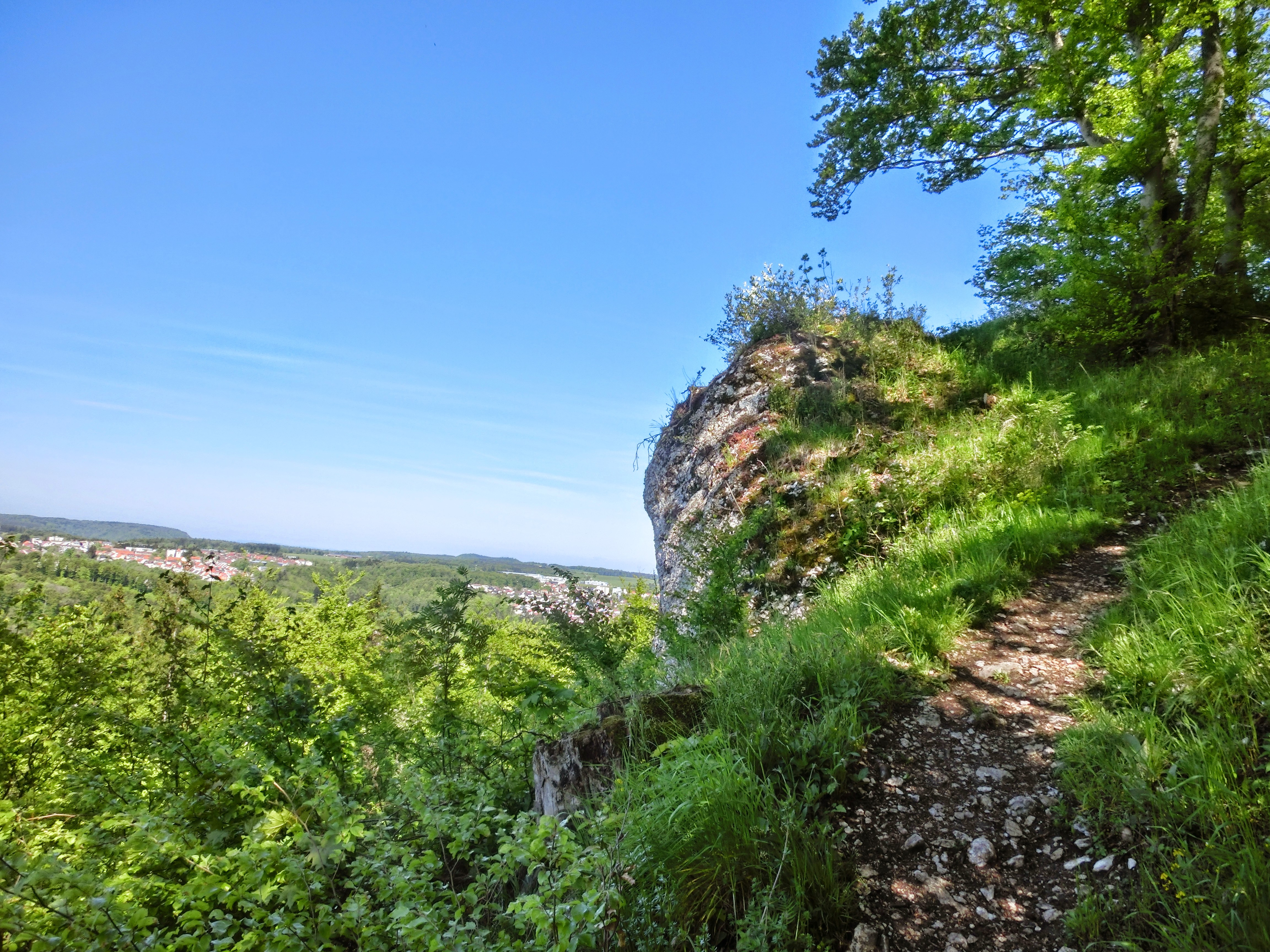 Deutschland (D) - Baden-Württemberg (BW) - Zollernalbkreis (BL) - Albstadt: im Naturschutzgebiet "Leimen"